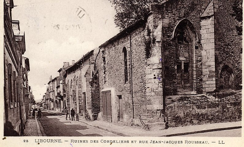 Rues de Libourne on post-cards